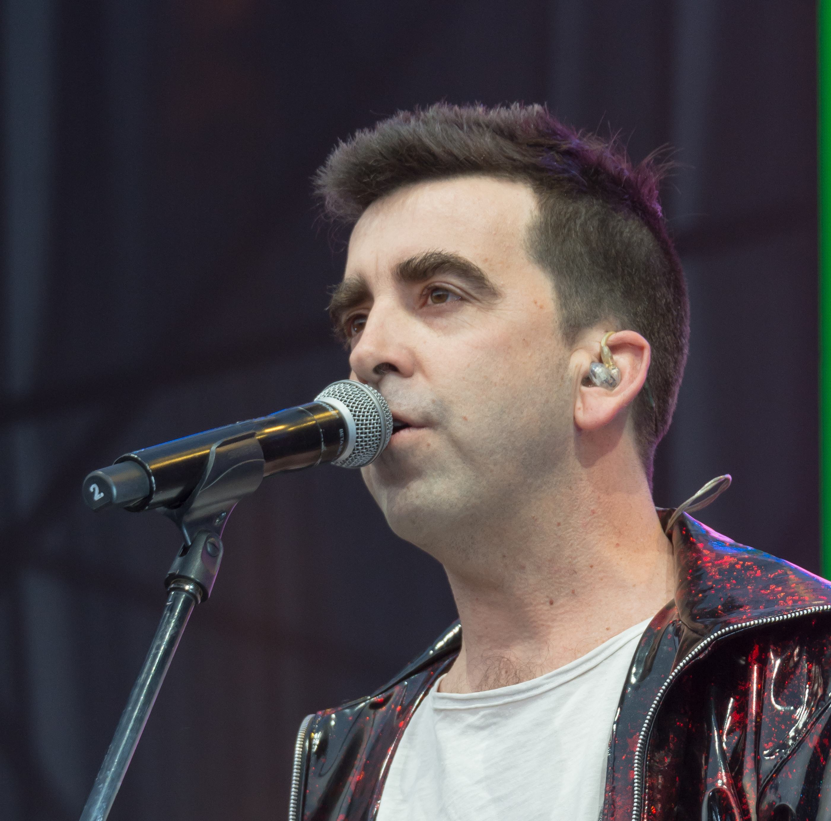 Pedropiedra, Día de la música chilena 2019, Velódromo del Estadio Nacional, Ñuñoa, Santiago, Chile.